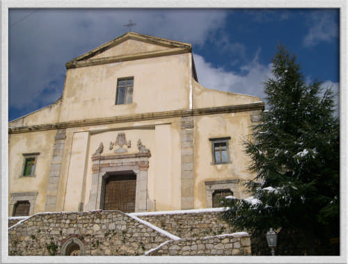 Chiesa di San Luca Galati Mamertino